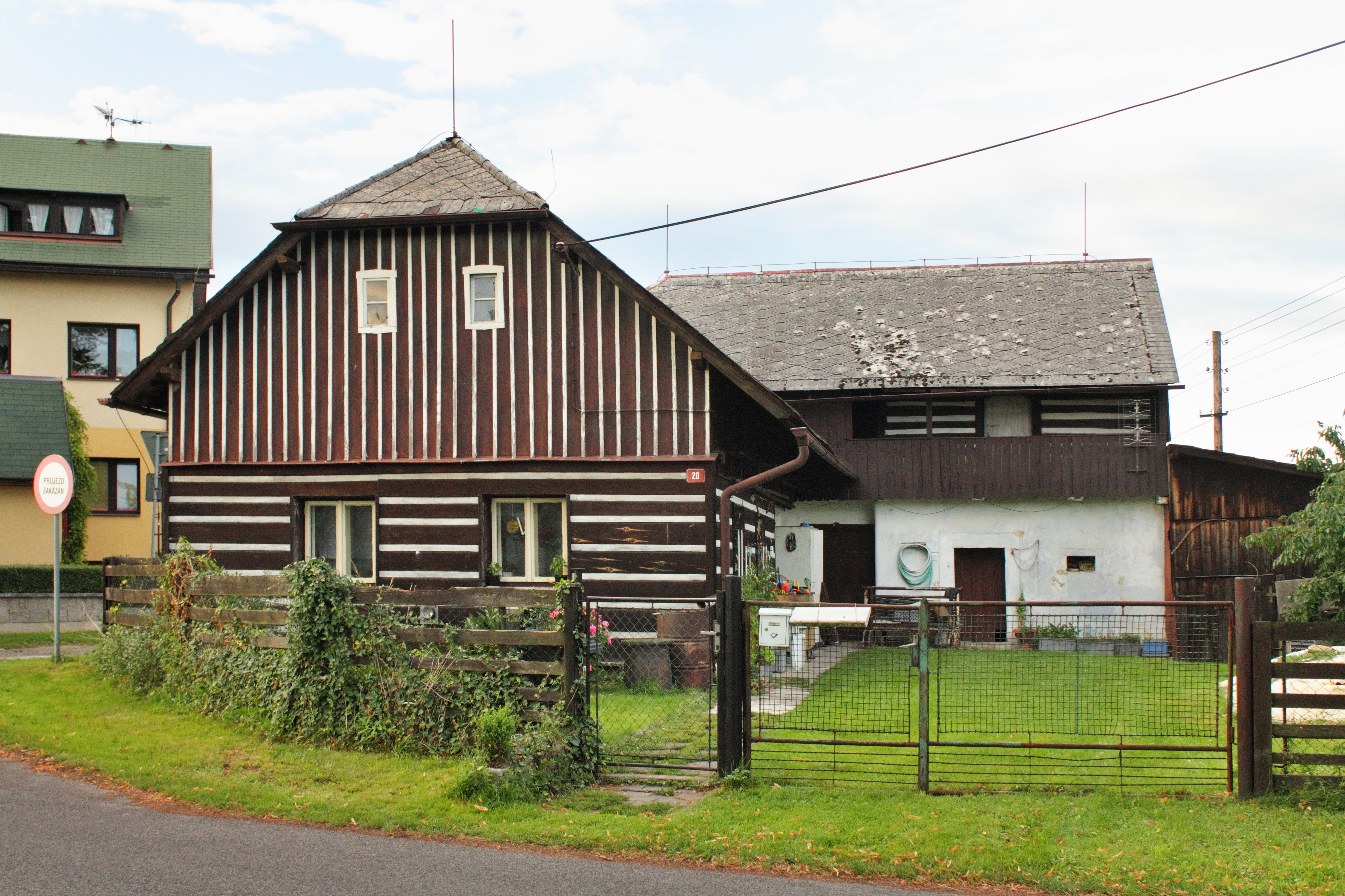 Česky: Čp 20, Paceřice